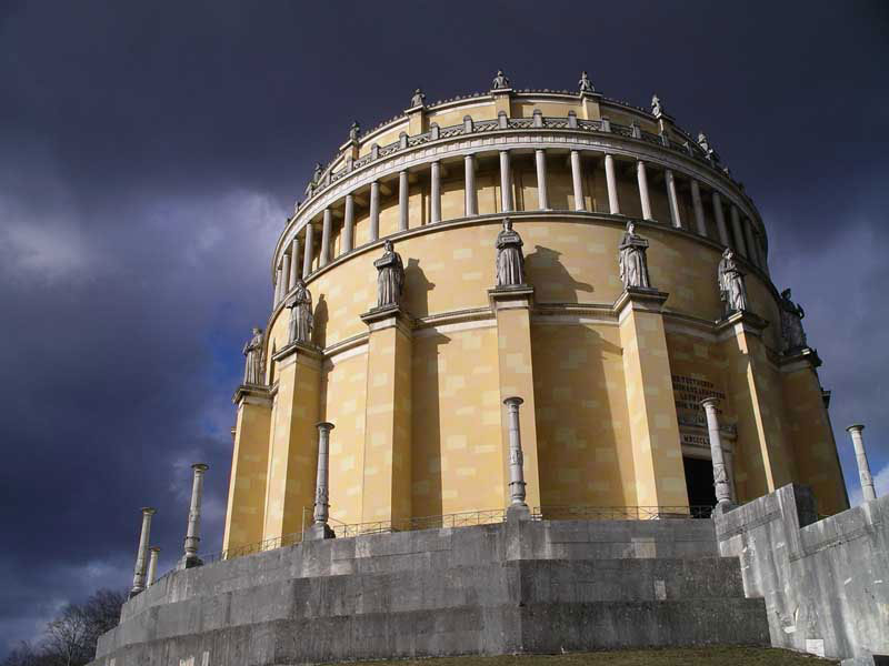 Befreiungshalle Kelheim, Außenansicht